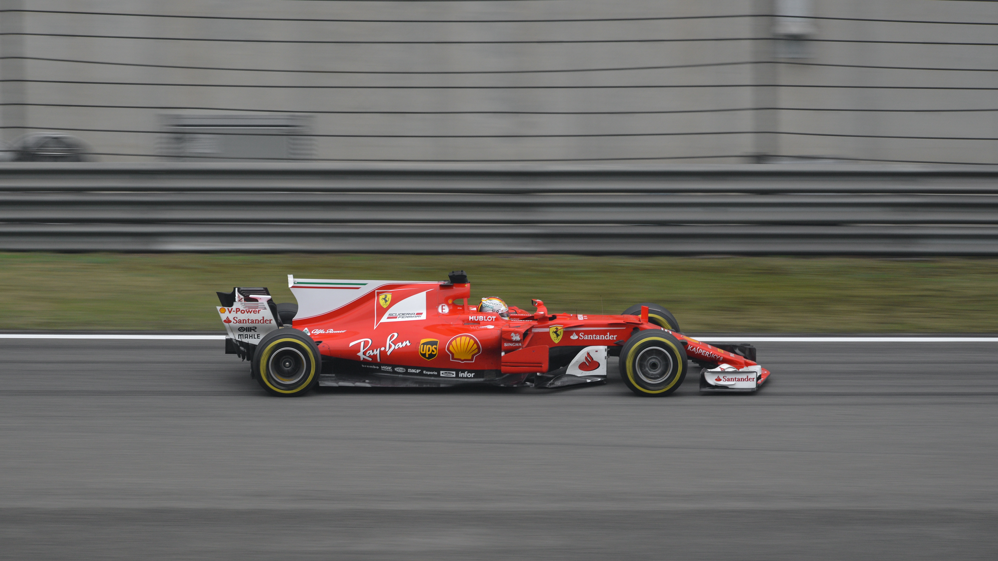 Sebastian Vettel